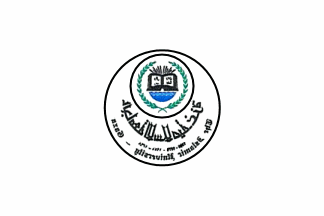 Drapeau de l'université islamique de Gaza